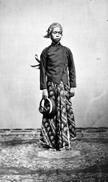 Negatief. Een jonge Javaan te Semarang, Java